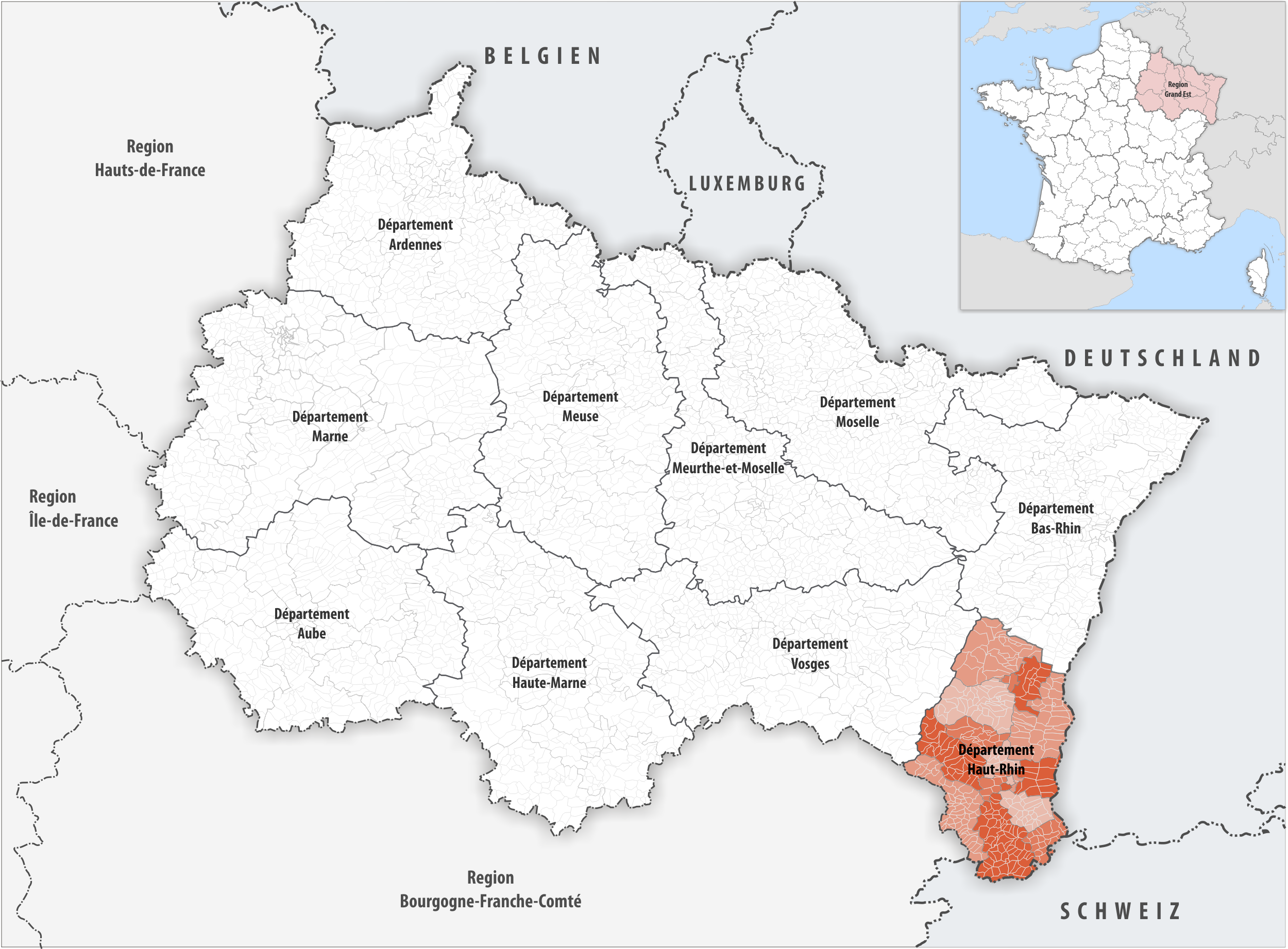 Lage des Departements Haut-Rhin